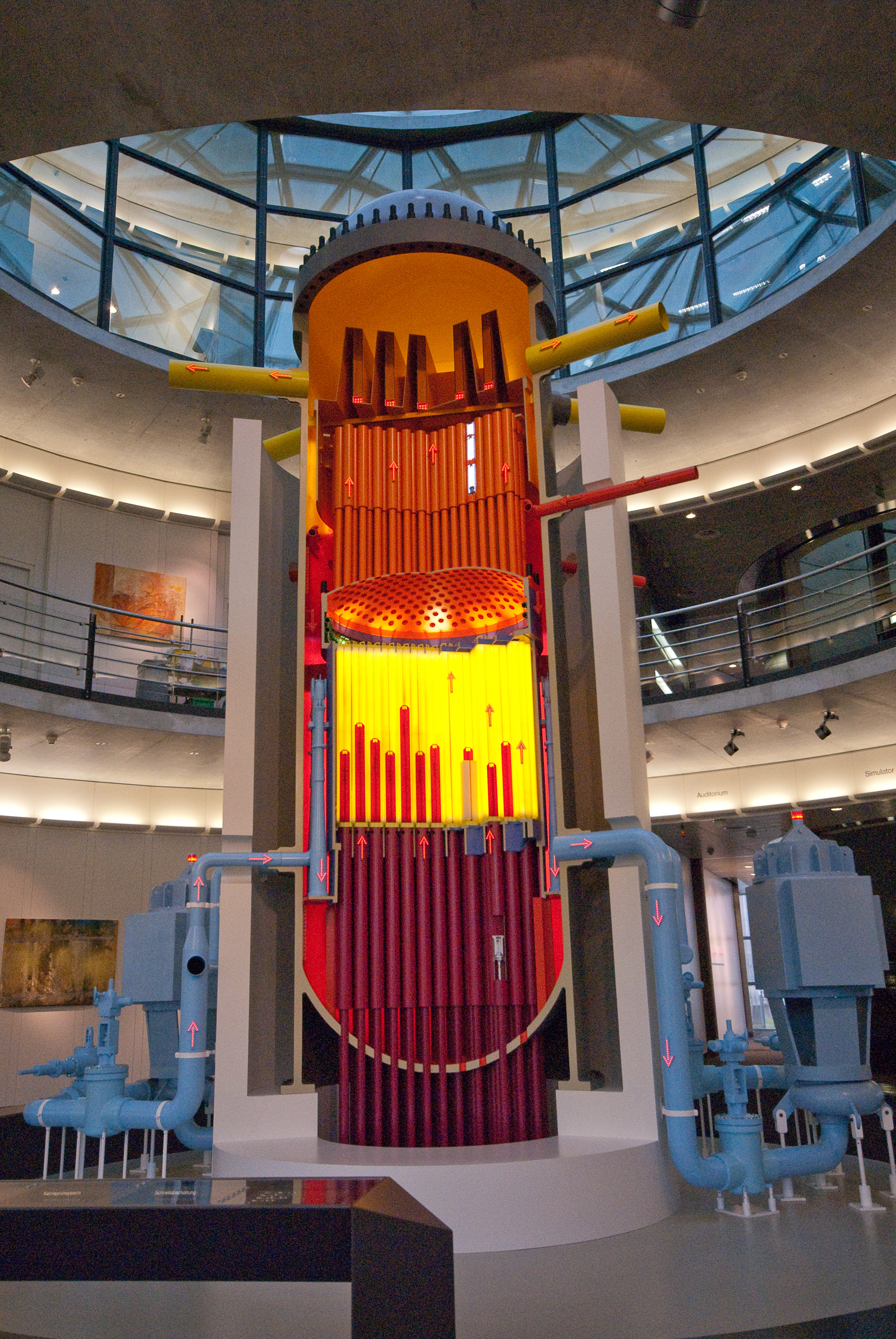 Reaktormodell